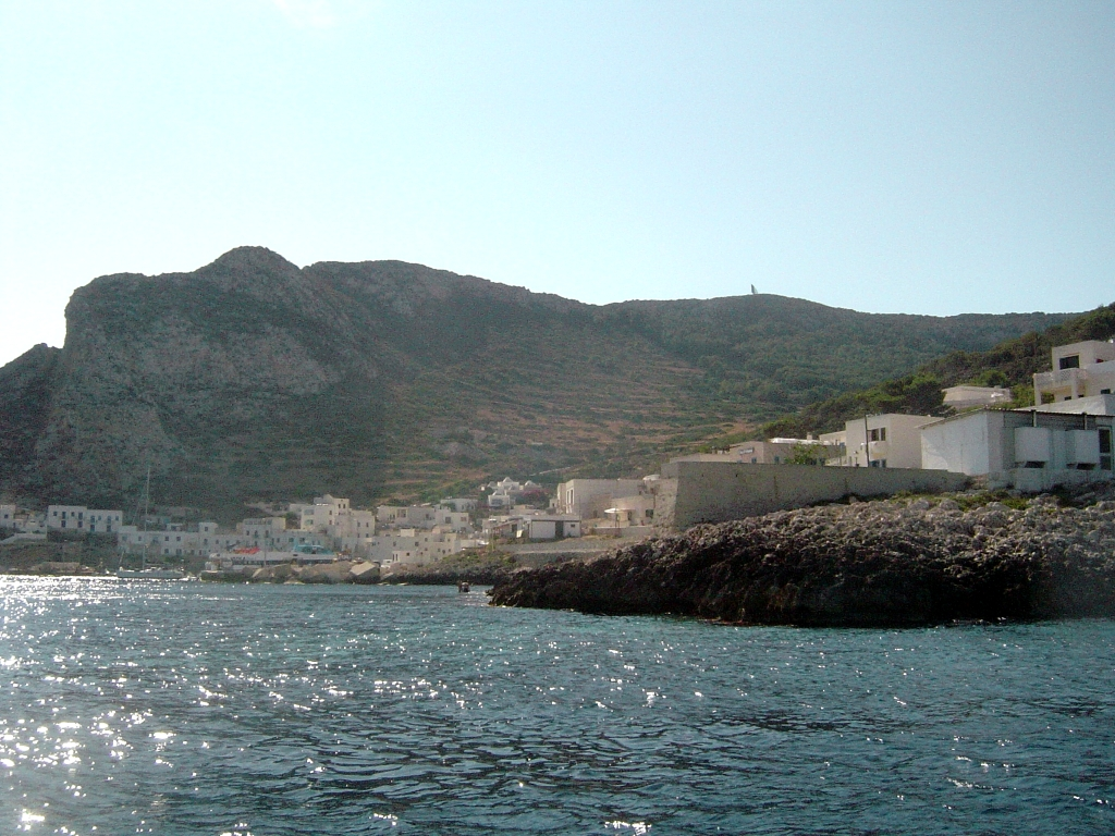 Levanzo village on Levanzo Island (TP), Italy